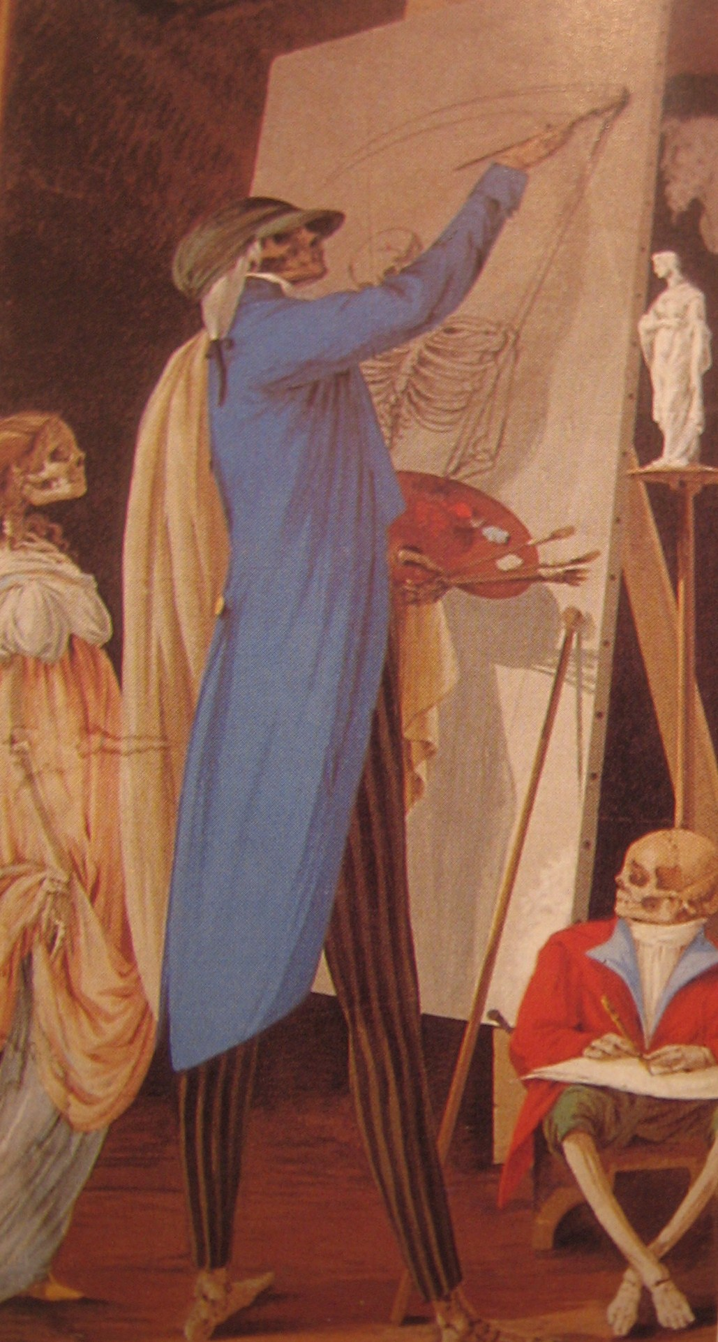 Il pittore